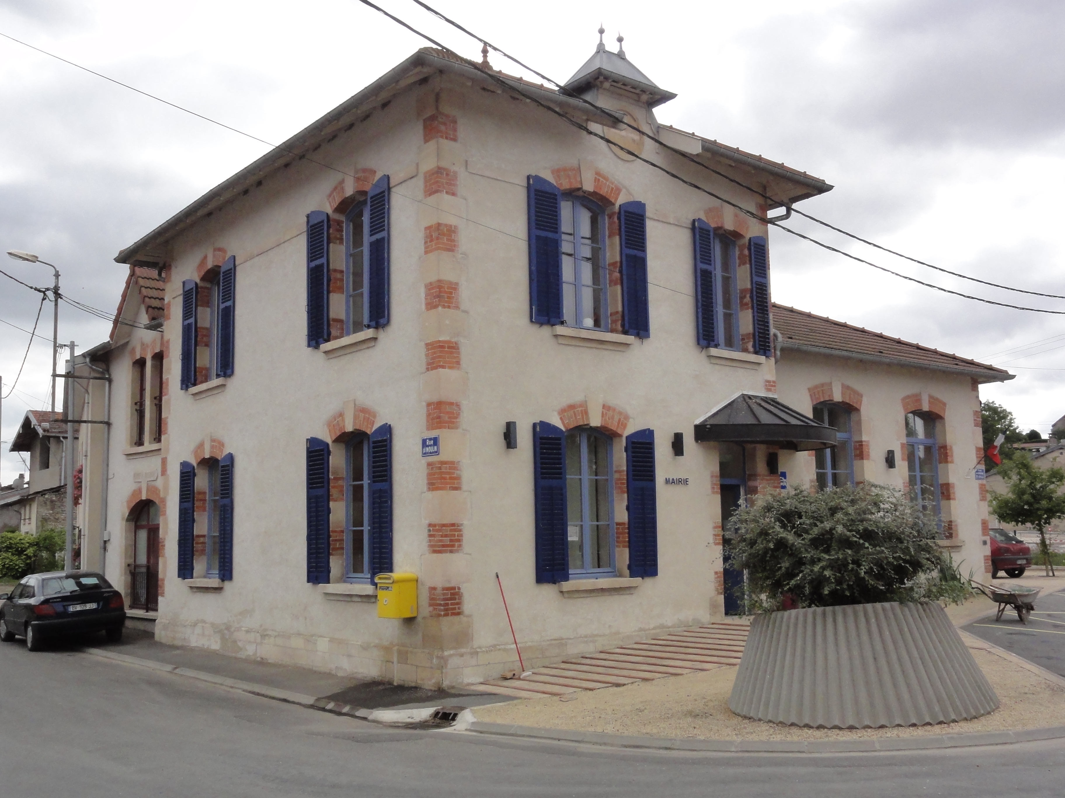 Érize-la-Brûlée (Meuse) mairie